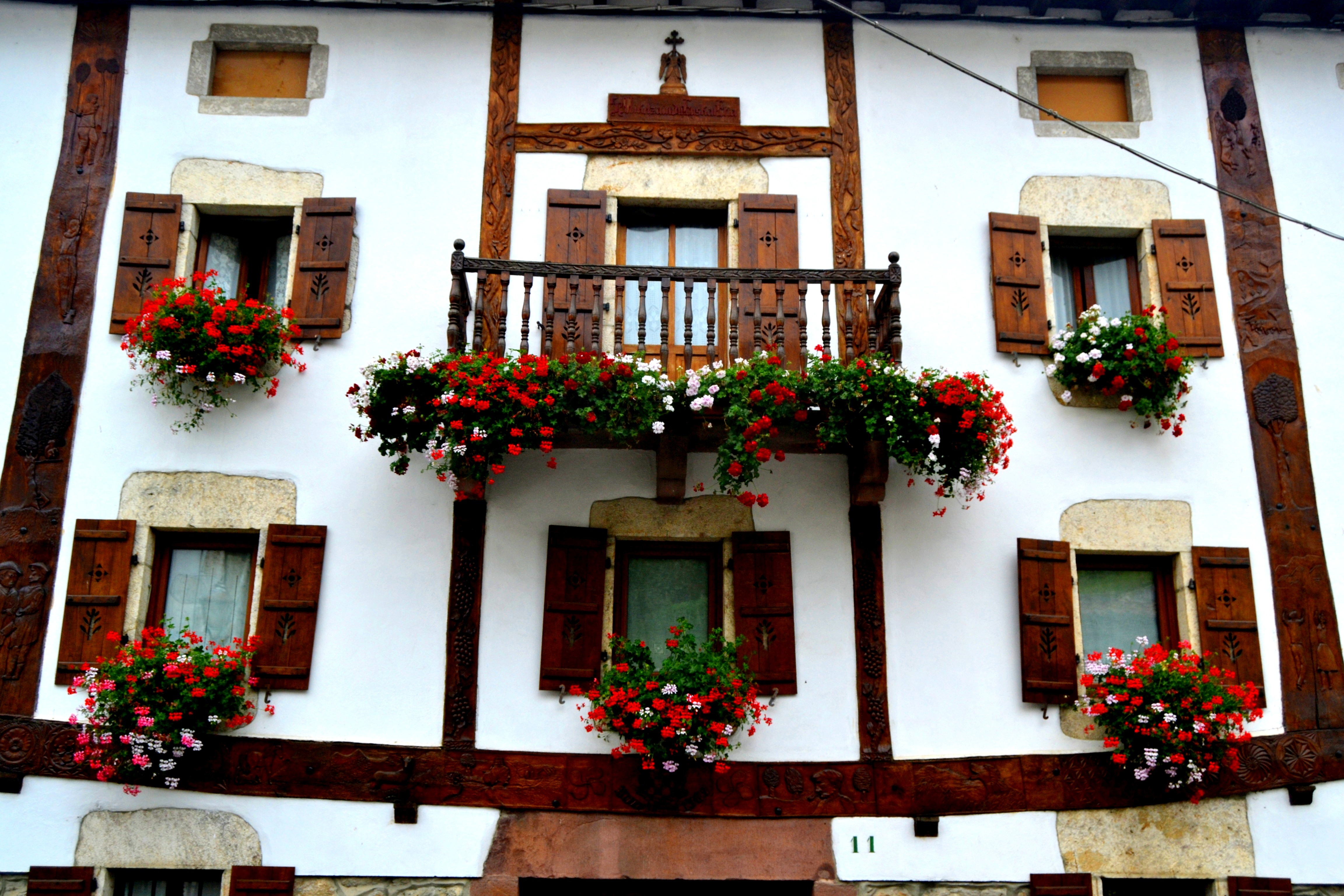 Etxatoa, Almandoz. Baztan, Nafarroa. Euskal Herria.